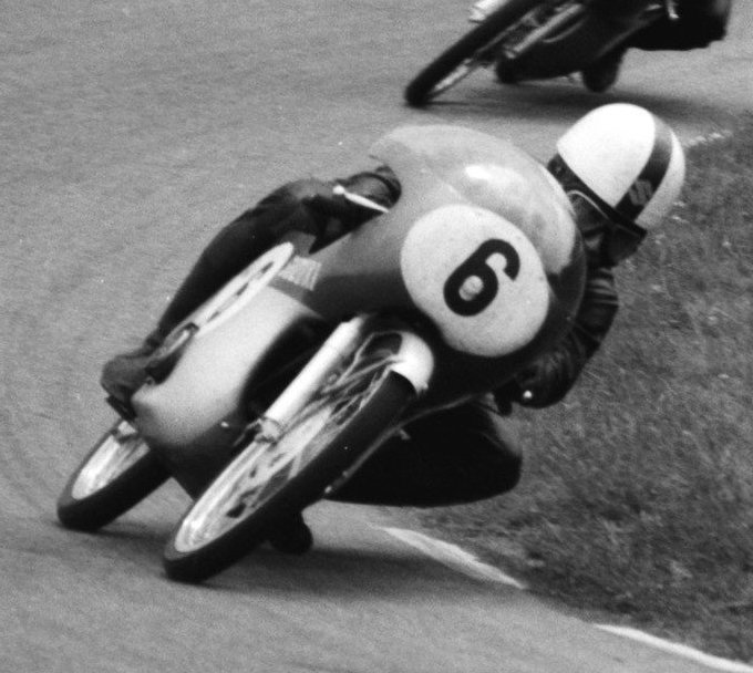 Collectie / Archief : Fotocollectie Anefo Reportage / Serie : TT Assen 1963 Beschrijving : TT te Assen. De 50cc klasse. Anderson, Itoh, Ichino, Degner Datum : 29 juni 1963 Locatie : Assen, Drenthe Trefwoorden : motorsport, motorsport, sport Persoonsnaam : Anderson, Degner, Ichino, Itoh Fotograaf : Bilsen, Joop van / Anefo Auteursrechthebbende : Nationaal Archief Materiaalsoort : Negatief (zwart/wit) Nummer archiefinventaris : bekijk toegang 2.24.01.04 Bestanddeelnummer : 915-3146